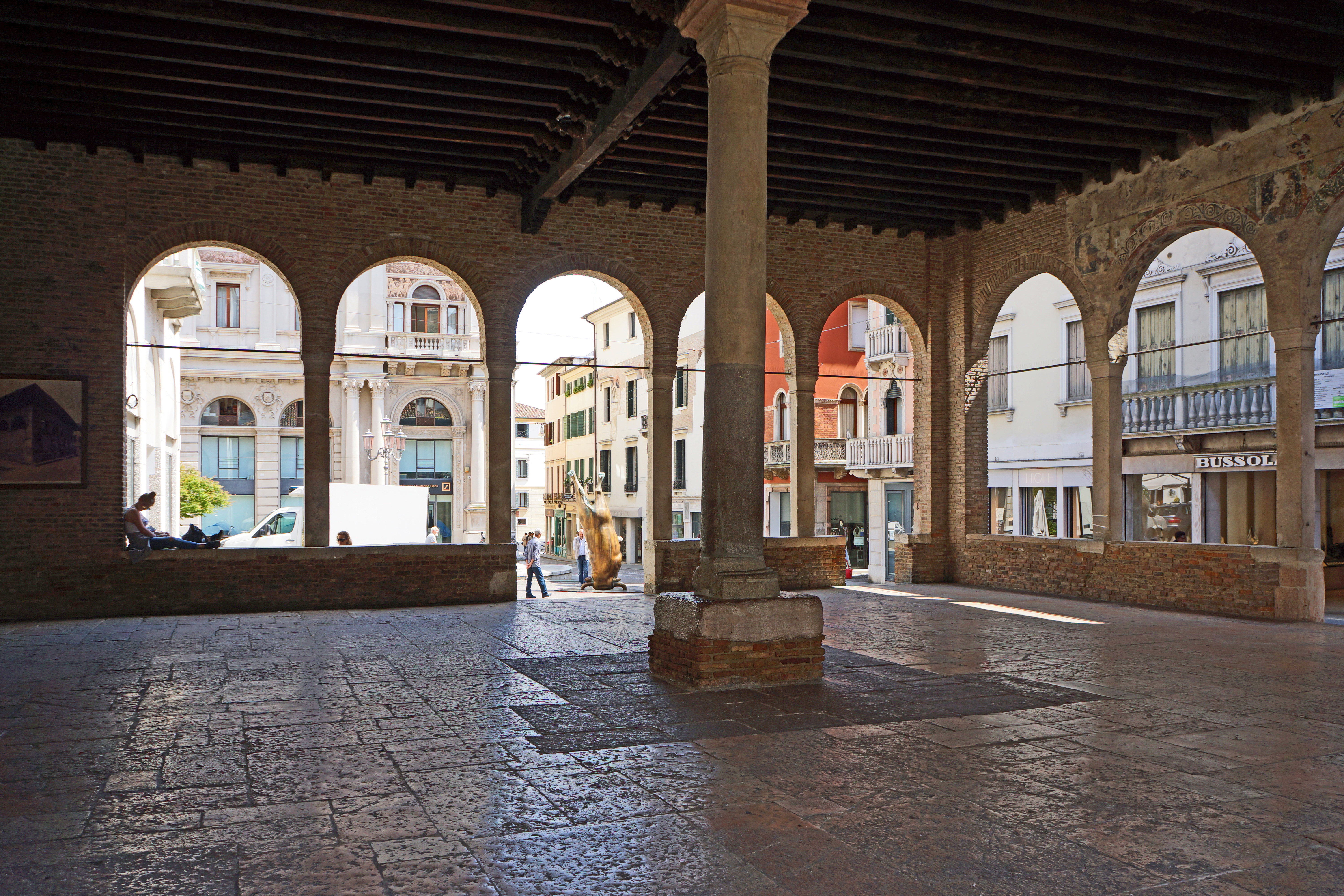 Loggia dei Cavalieri, edificio romanico del XIII secolo, già luogo di ritrovo della nobiltà This is a photo of a monument which is part of cultural heritage of Italy.